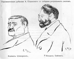 Бейлис и Файвел Шнеерсон на суде Beilis and Fayvel Shneerson in the Beilis trial